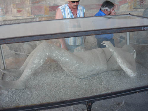 Помпеи. "Отпечатки" жертв вулкана